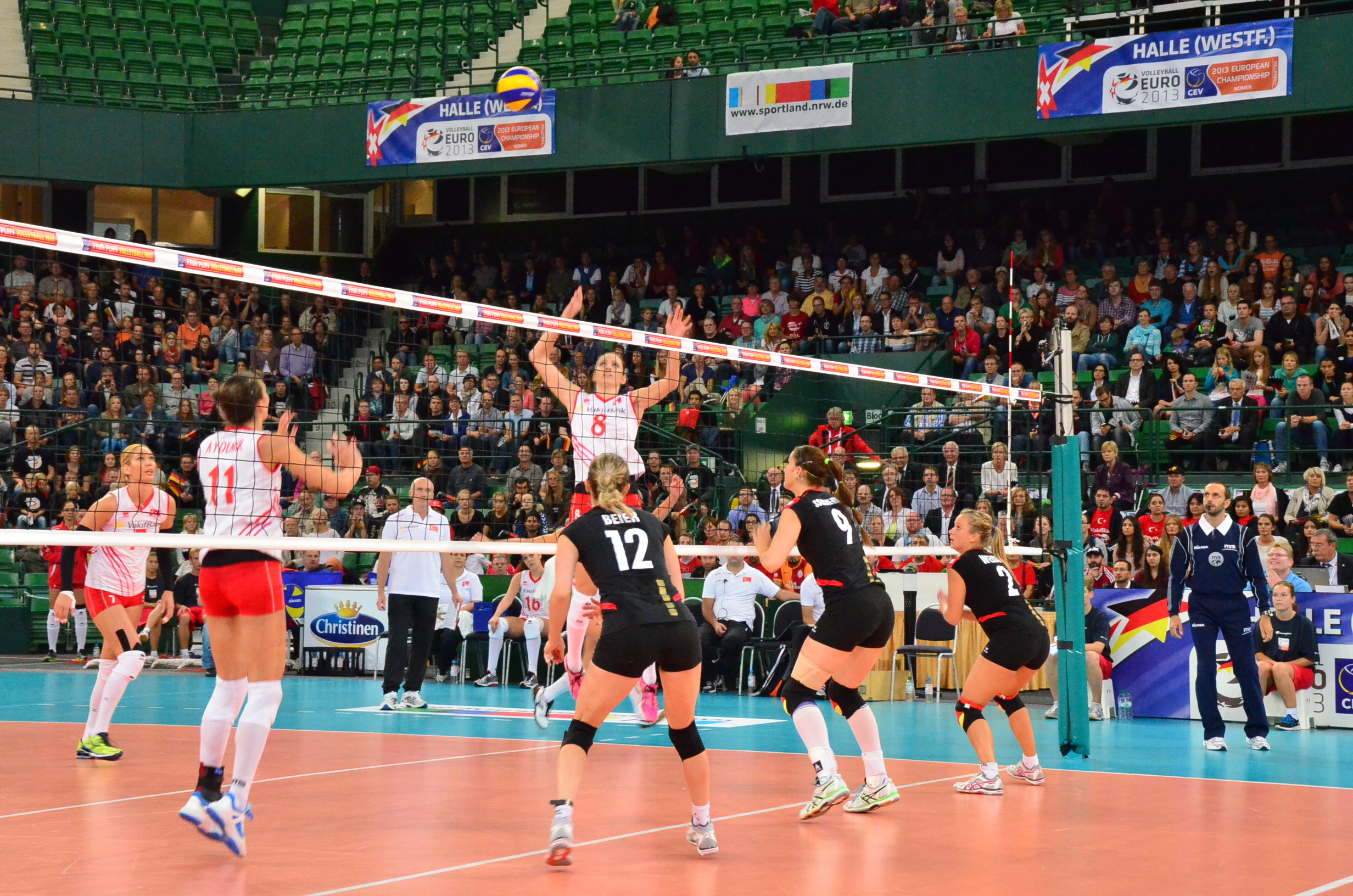 Volleyball-Europameisterschaft der Frauen 2013-Spielort Halle (Westf) Gerry-Weber-Stadion - Spiel 8. September 2013 (Deutschland-Türkei)